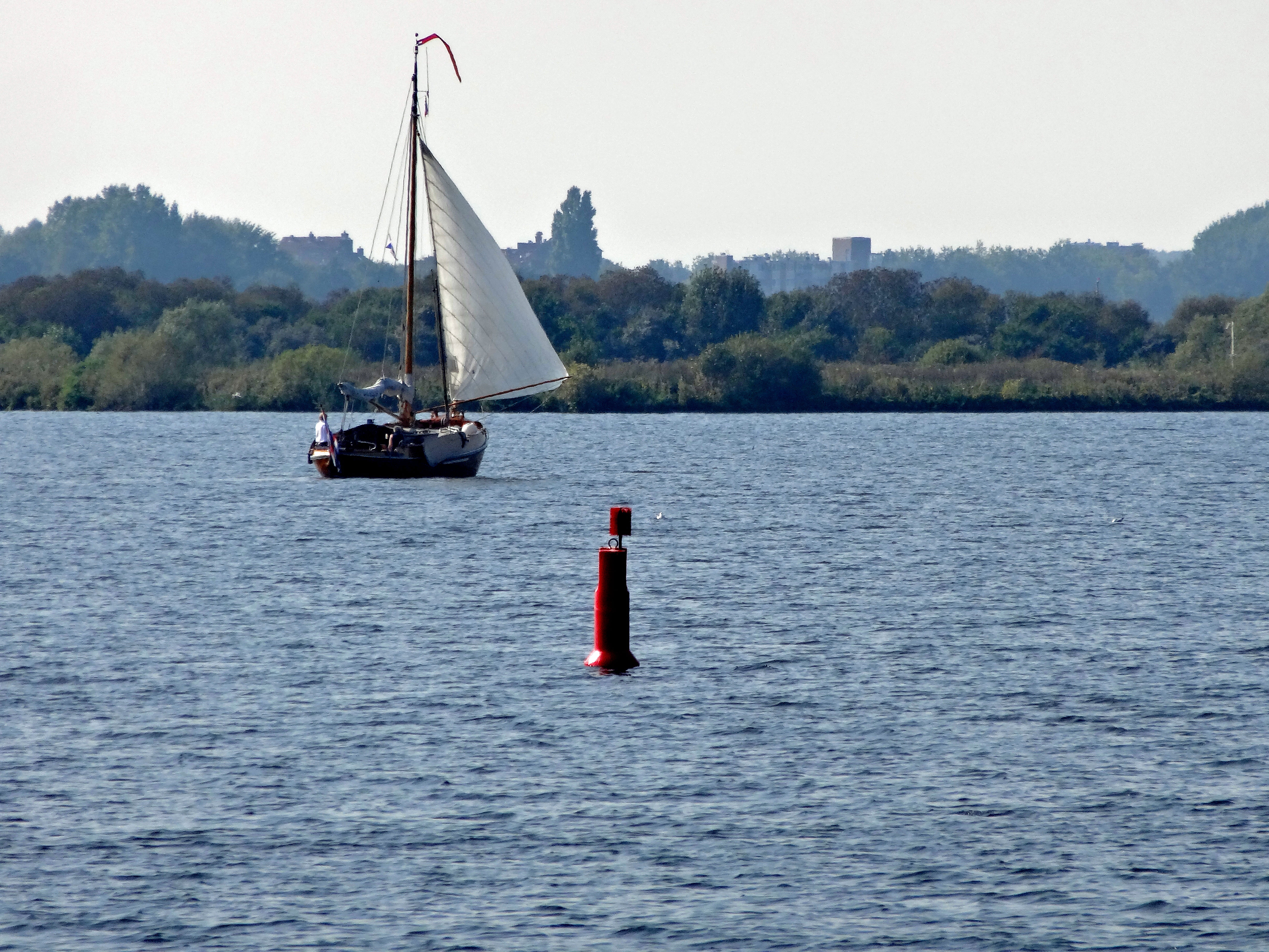 Gooimeer, op de achtergrond het eilandje Huizerhoef